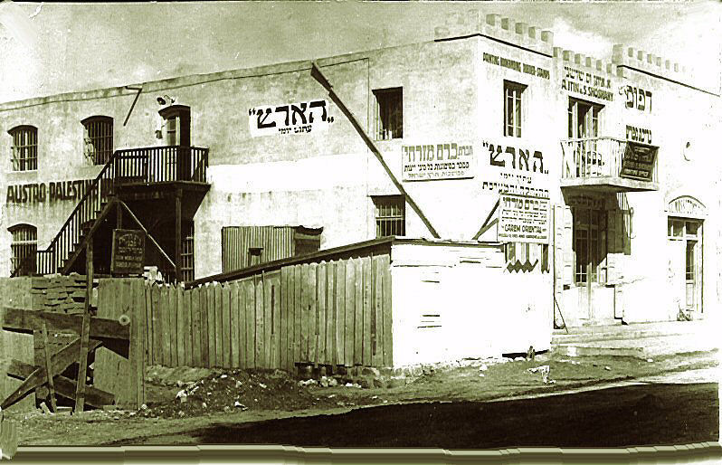 בית דפוס שושני בדרך יפו 5